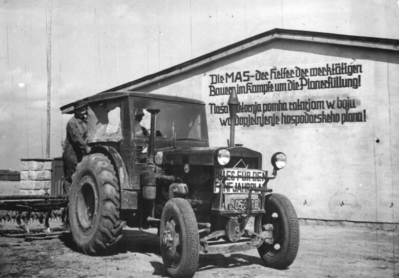 Panschwitz, Traktor die MAS verlassend Zentralbild Klein Gr-Qu. 20.4.1951 Die neuerrichtete deutsch-sorbische MAS-Station in Panschwitz-Kr.Kamenz. Die neue, vorbildlich eingerichtete MAS-Station in Panschwitz-Kr.Kamenz entstand im Jahre 1950 innerhalb von drei Monaten. - Hier arbeiten Deutsche und Angehörige der sorbischen Volksgruppe vorbildlich zusammen bei der Erfüllung der an die MAS gestellten Aufgaben zur Weiterentwicklung der Landwirtschaft innerhalb des 5-Jahrplanes. Auch die notwendige Zusammenarbeit zwischen der MAS und den schaffenden deutschen und sorbischen Bauern hat sich gut entwickelt und bewährt. In allen Fragen der Landwirtschaft wenden sich die Bauern an ihre MAS-Station.